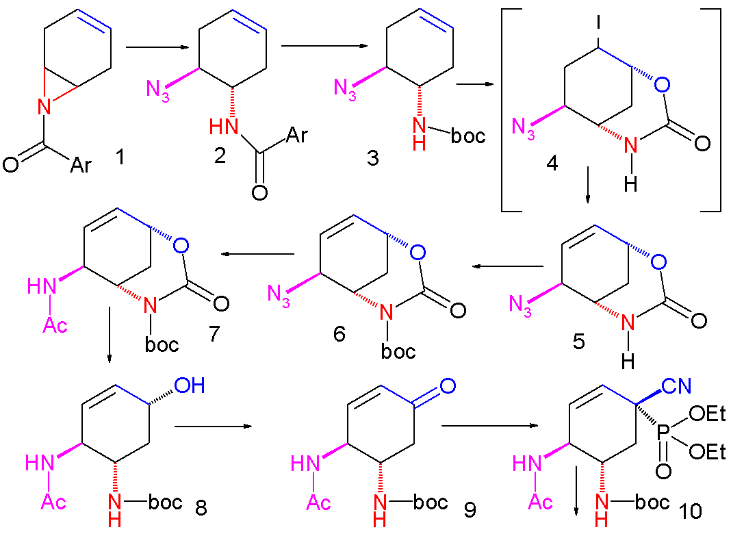 ShibasakiTamifluSynthesisPartI.png